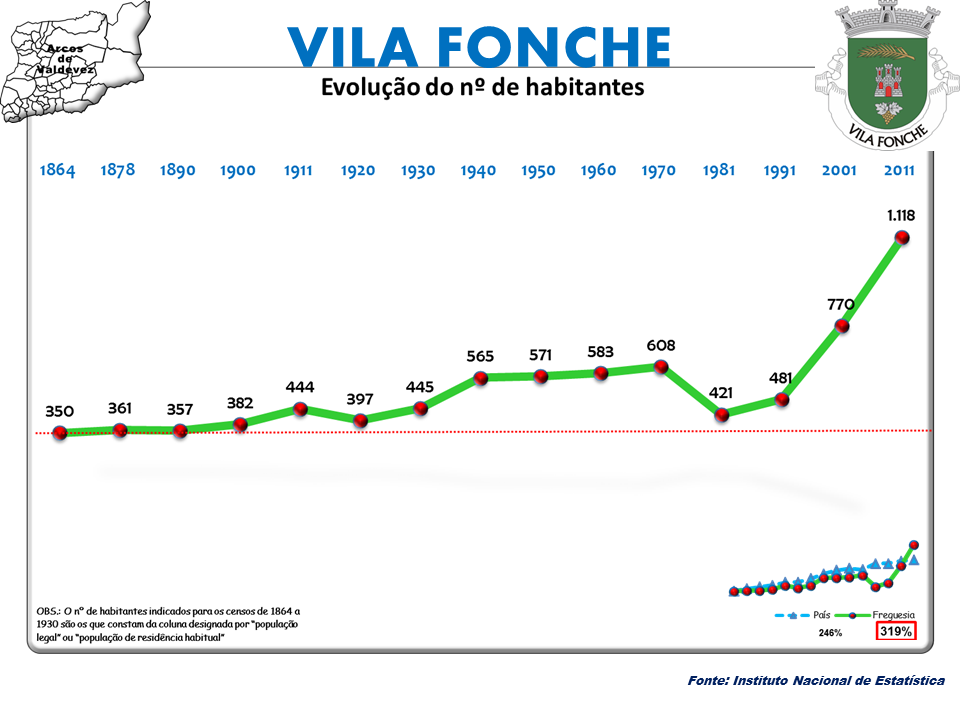 Censos 1864/2011